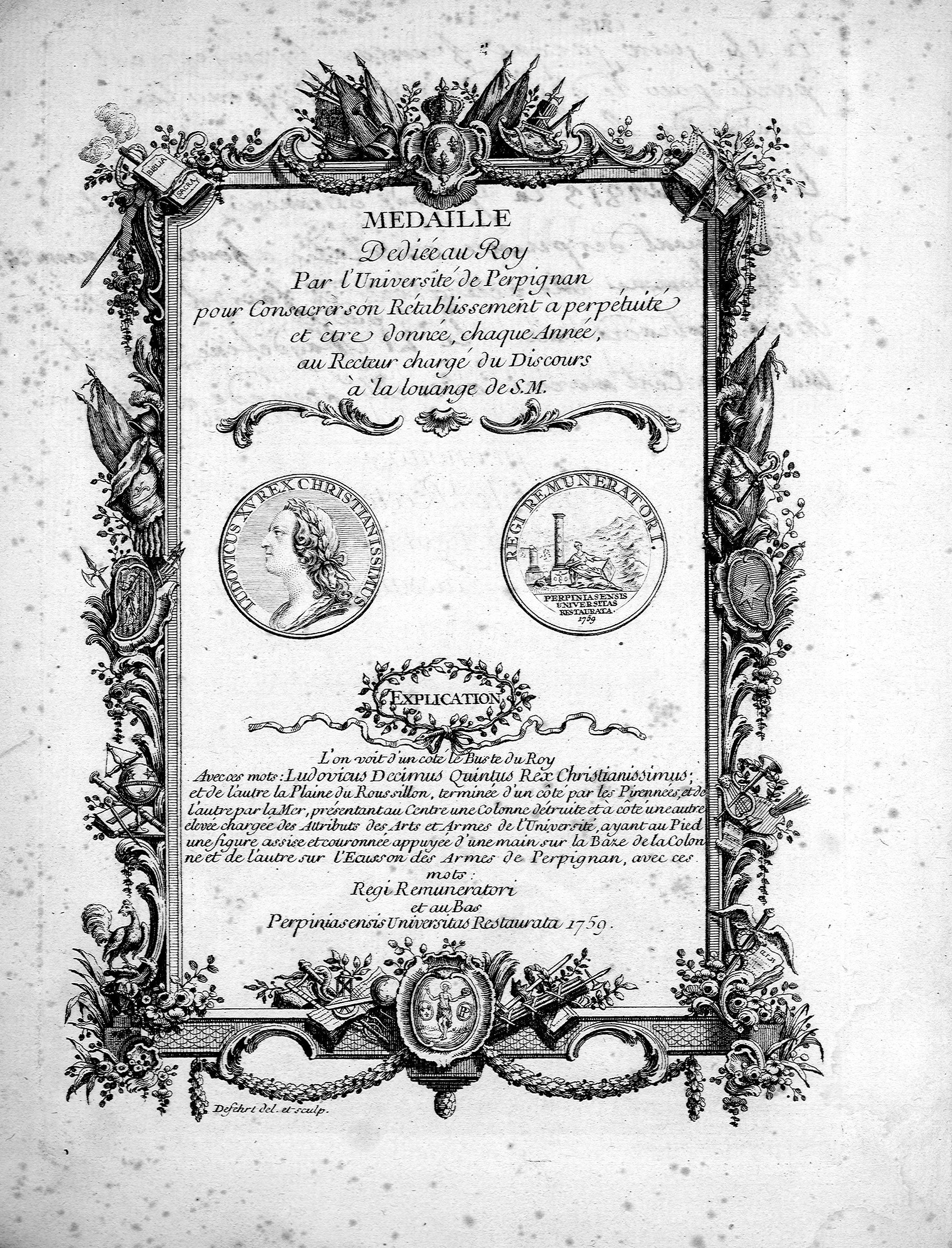 Description de la médaille dédiée au roi Louis XV par l'Université de Perpignan en 1759